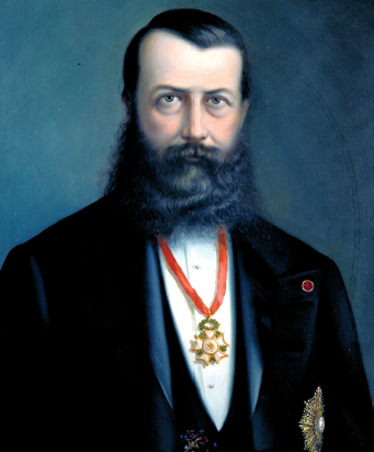 Retrat de Guillem d'Areny-Plandolit, impulsor de la Nova Reforma.